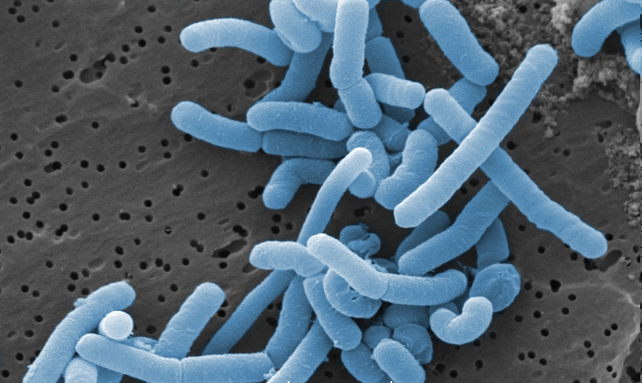 Kolorierte rasterelektronenmikroskopische Aufnahmen von Lactobacillus paracasei